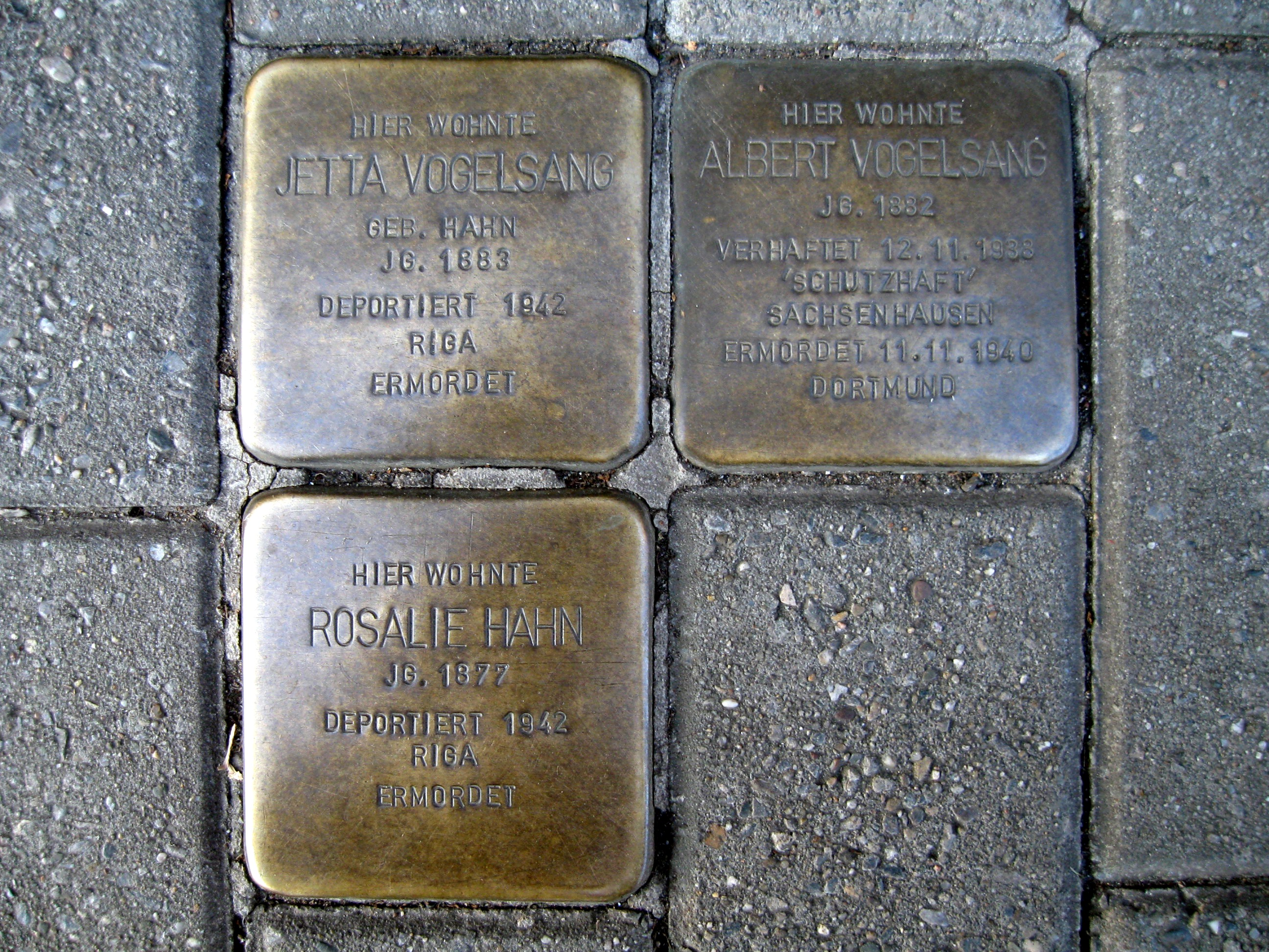 Stolpersteine in Dortmund, Brackeler Hellweg 146